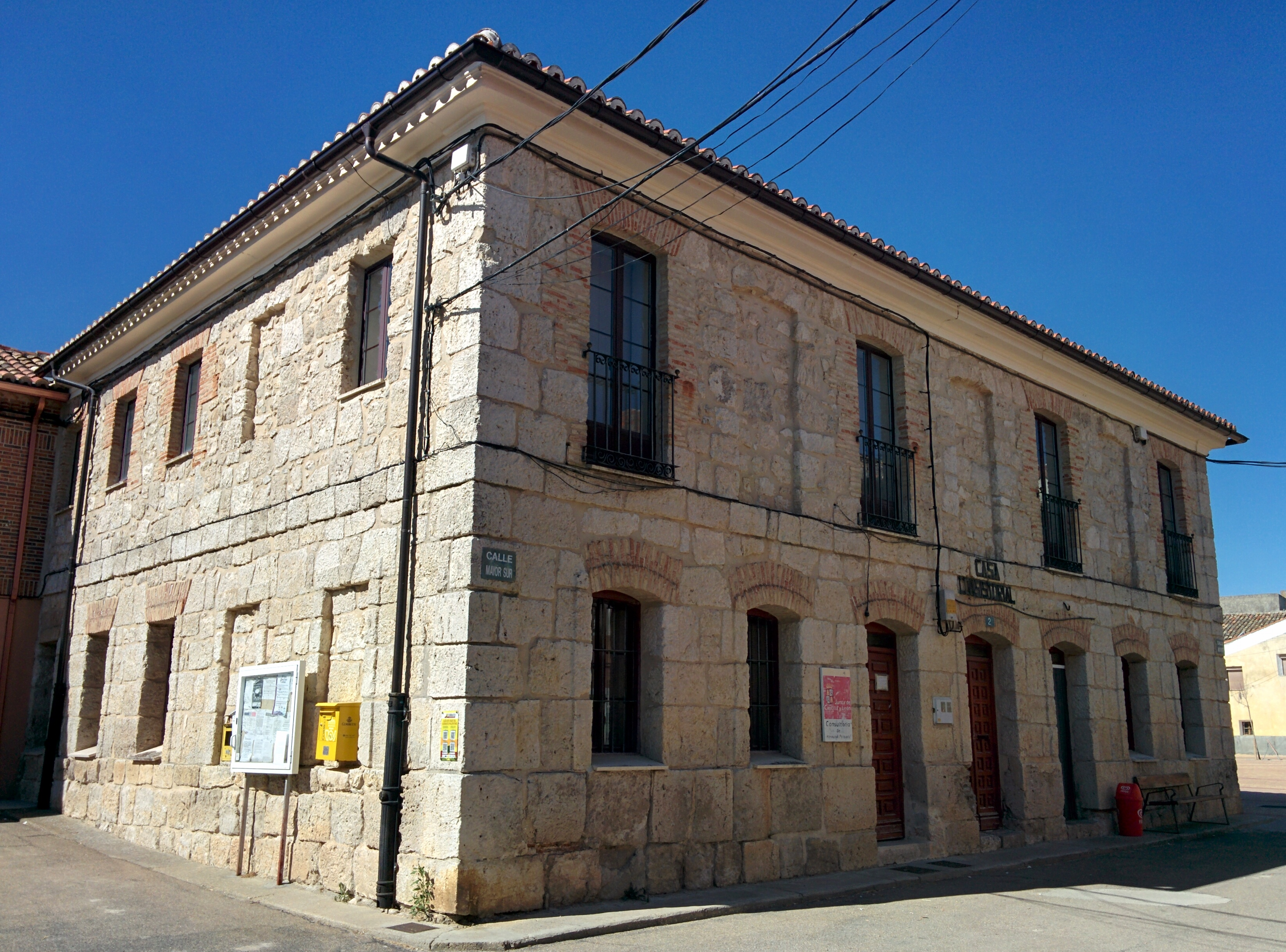 Casa consistorial de Castrillo de Onielo (Palencia, España).